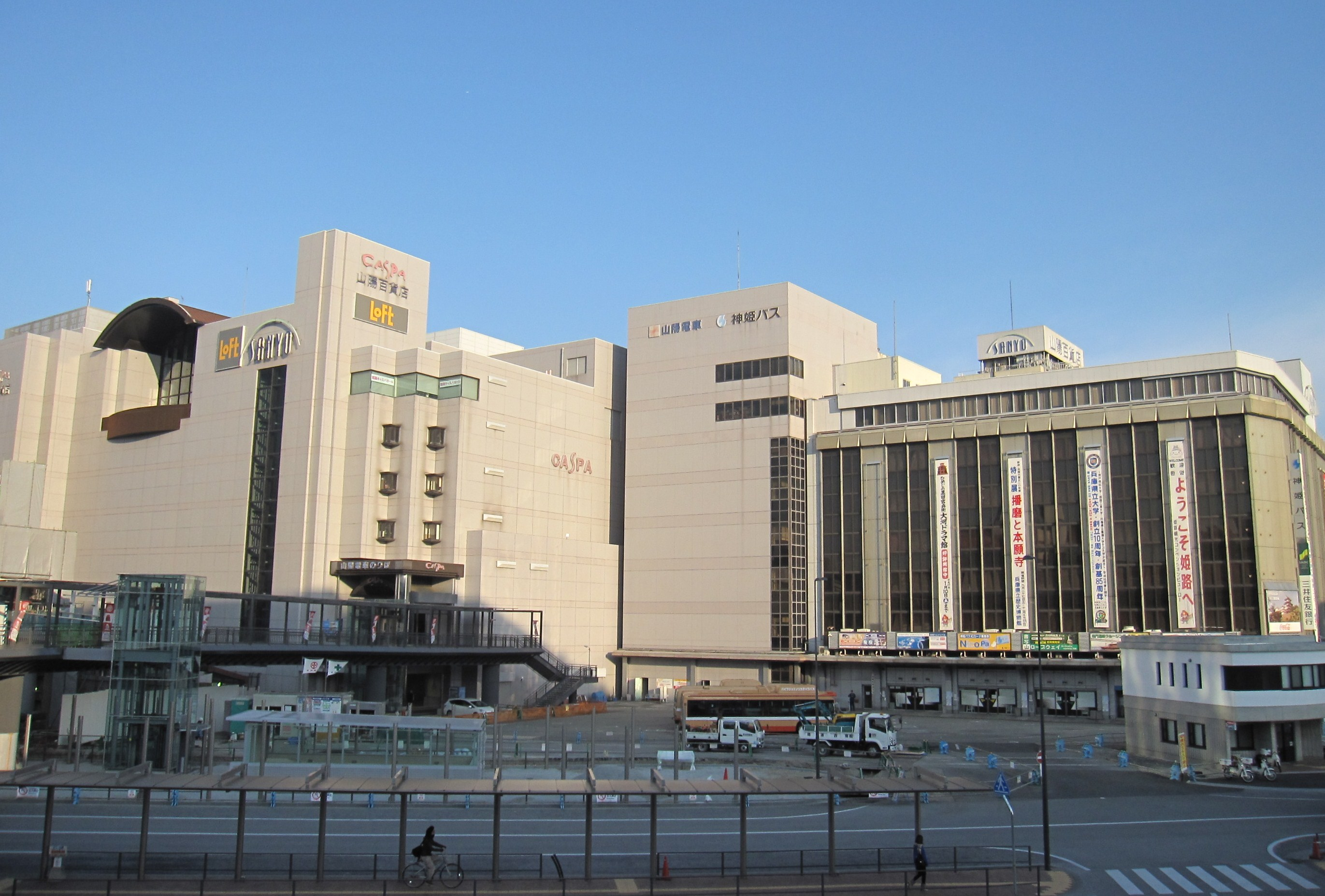 神姫バス本社